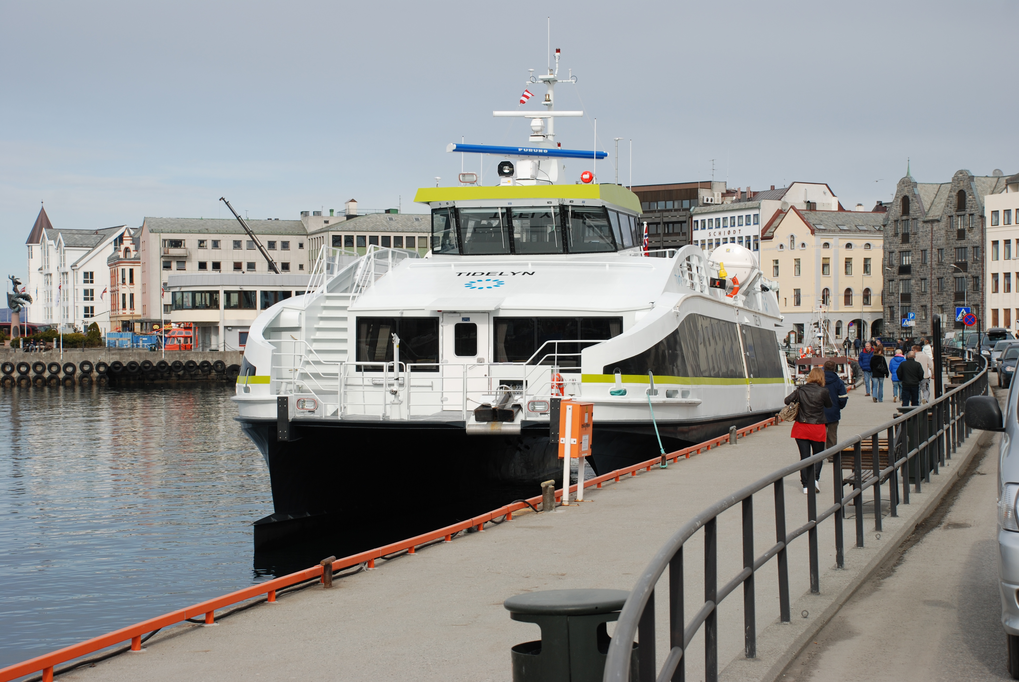 MS Tidelyn. Ålesund. Foto Harald Sætre.